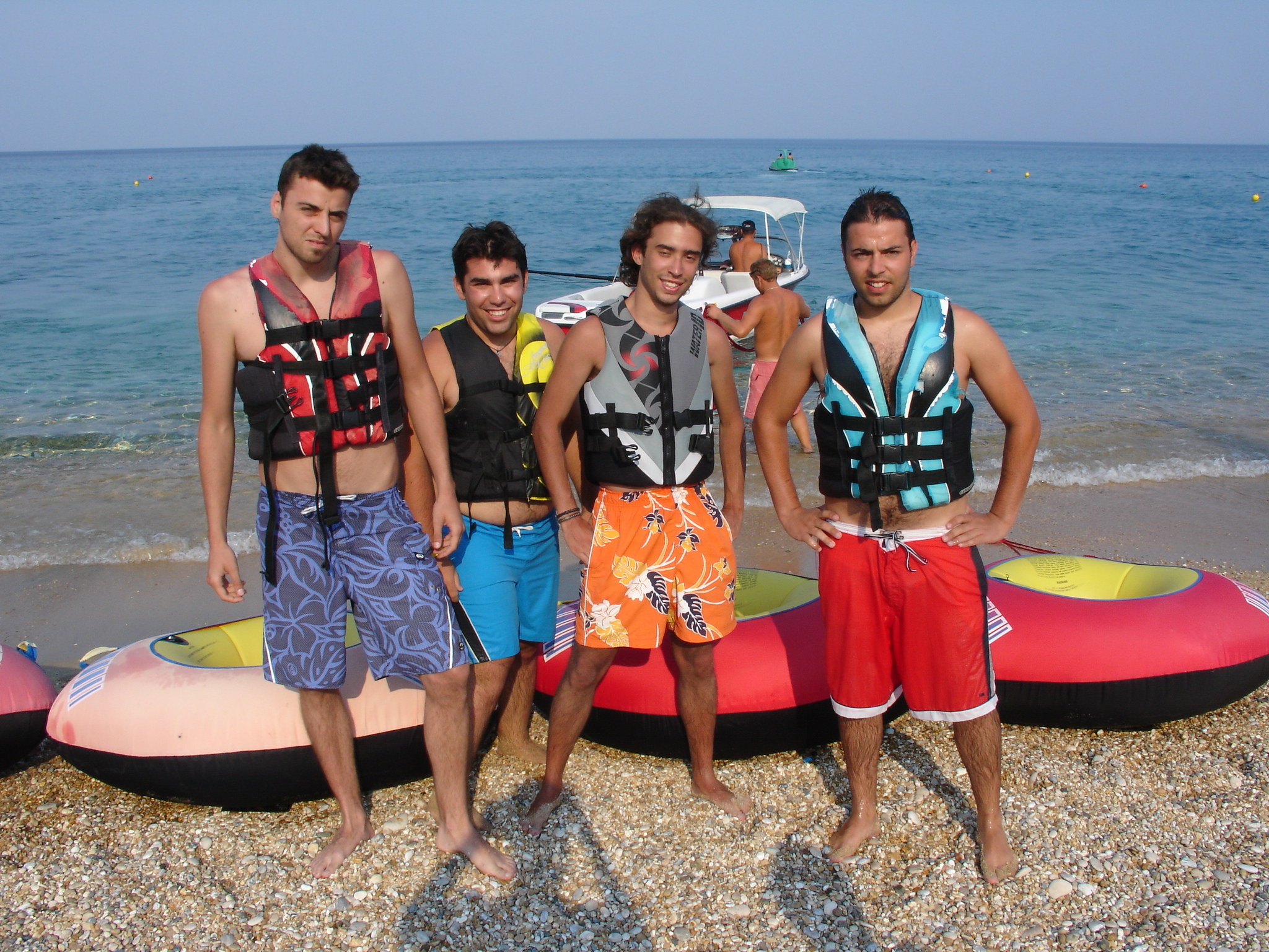 ???? ???? ?? water sports ???? ??????? ?????.